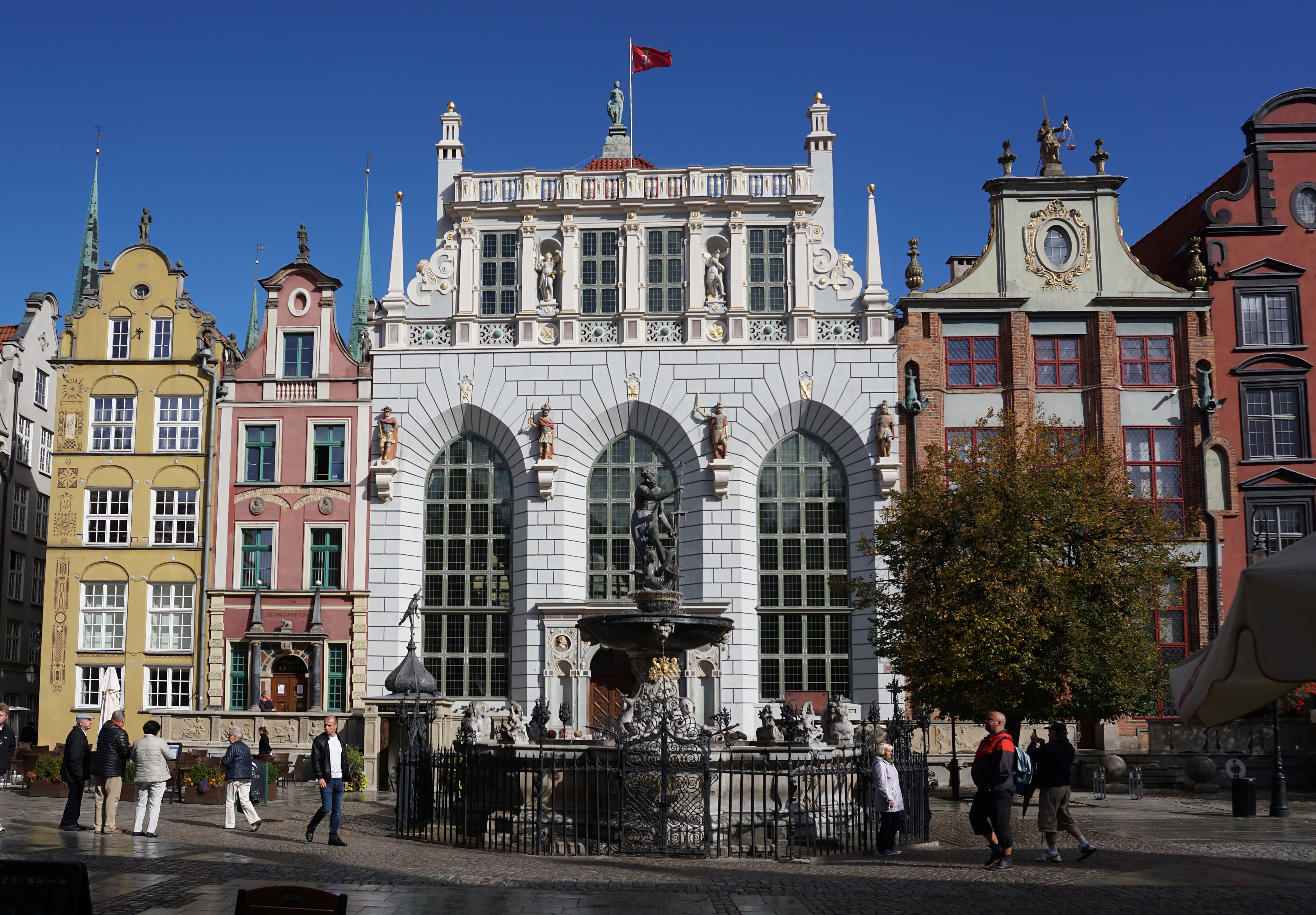 Dwór Artusa w centrum, po lewej Stary Dom Ławy (tam znajduje się obecnie wejście do Dworu Artusa), po prawej Nowy Dom Ławy (władzy sądowniczej w dawnym mieście), przed Dworem Fontanna Neptuna.